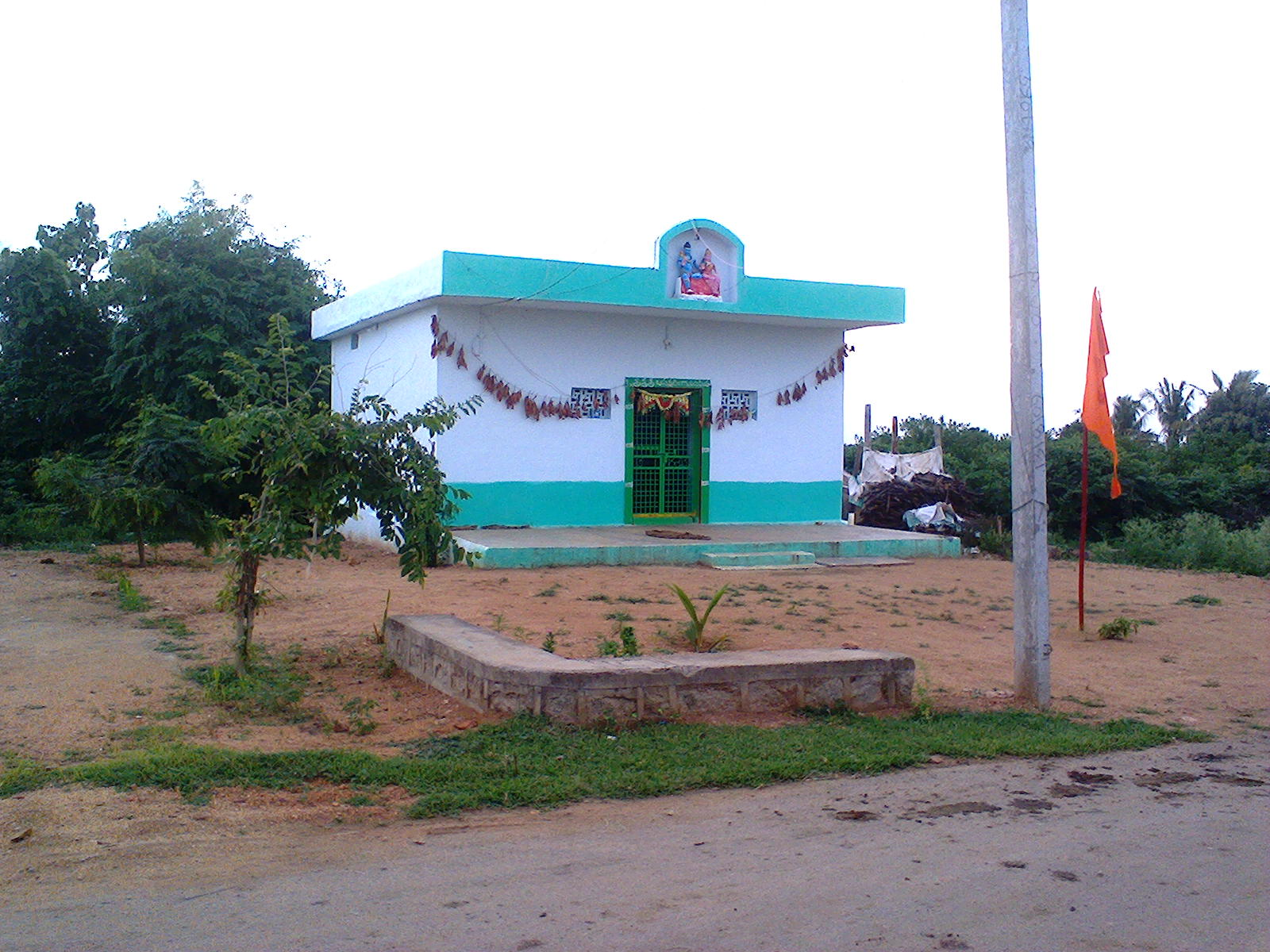 శివాలయం